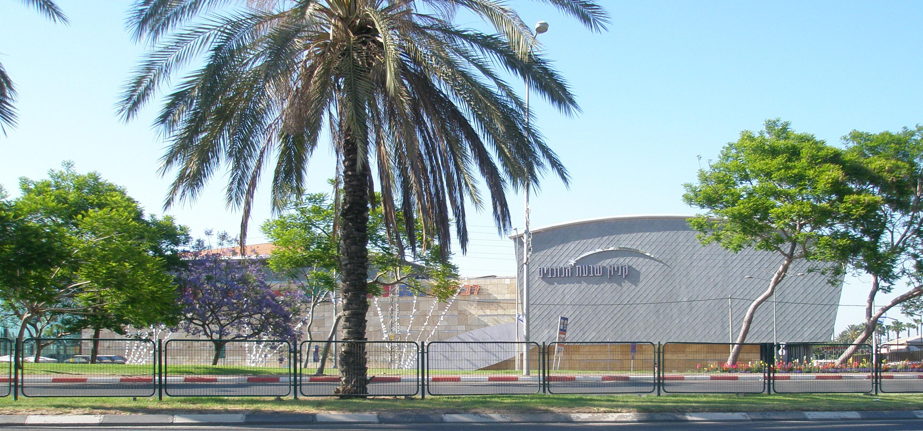 Kanyon Shivat Hakochavim, Herzliya